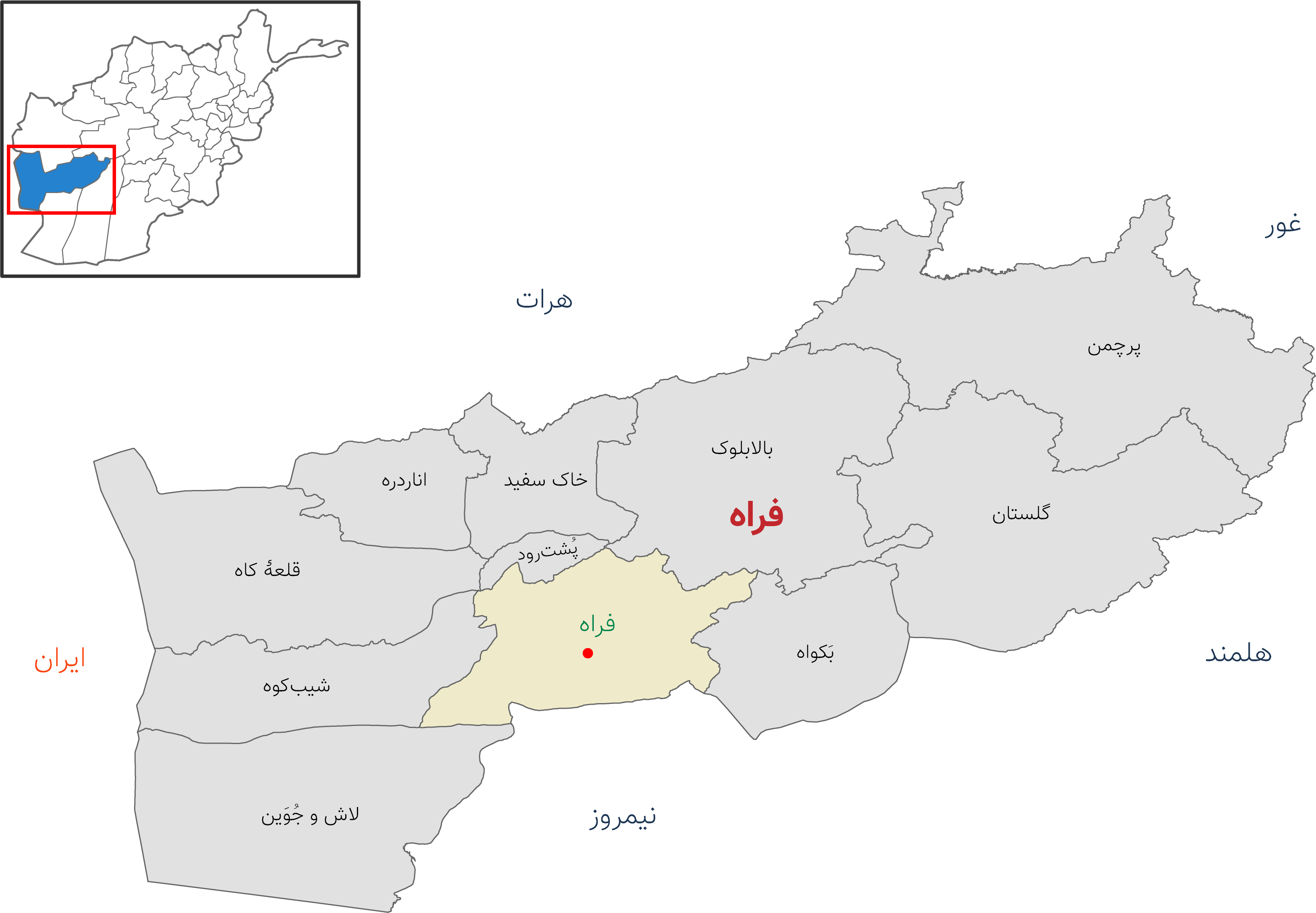 نقشه ولایت فراه